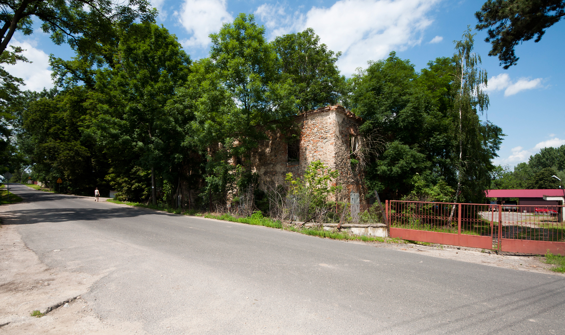 dwór, ob. ruina Wiry 1, Marcinowice